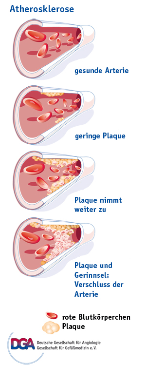 Schema Atherosklerose (Arterienverkalkung; Atherosklerose ist eine Hauptursache für die Durchblutungsstörung der Beine und des Beckens (PAVK).